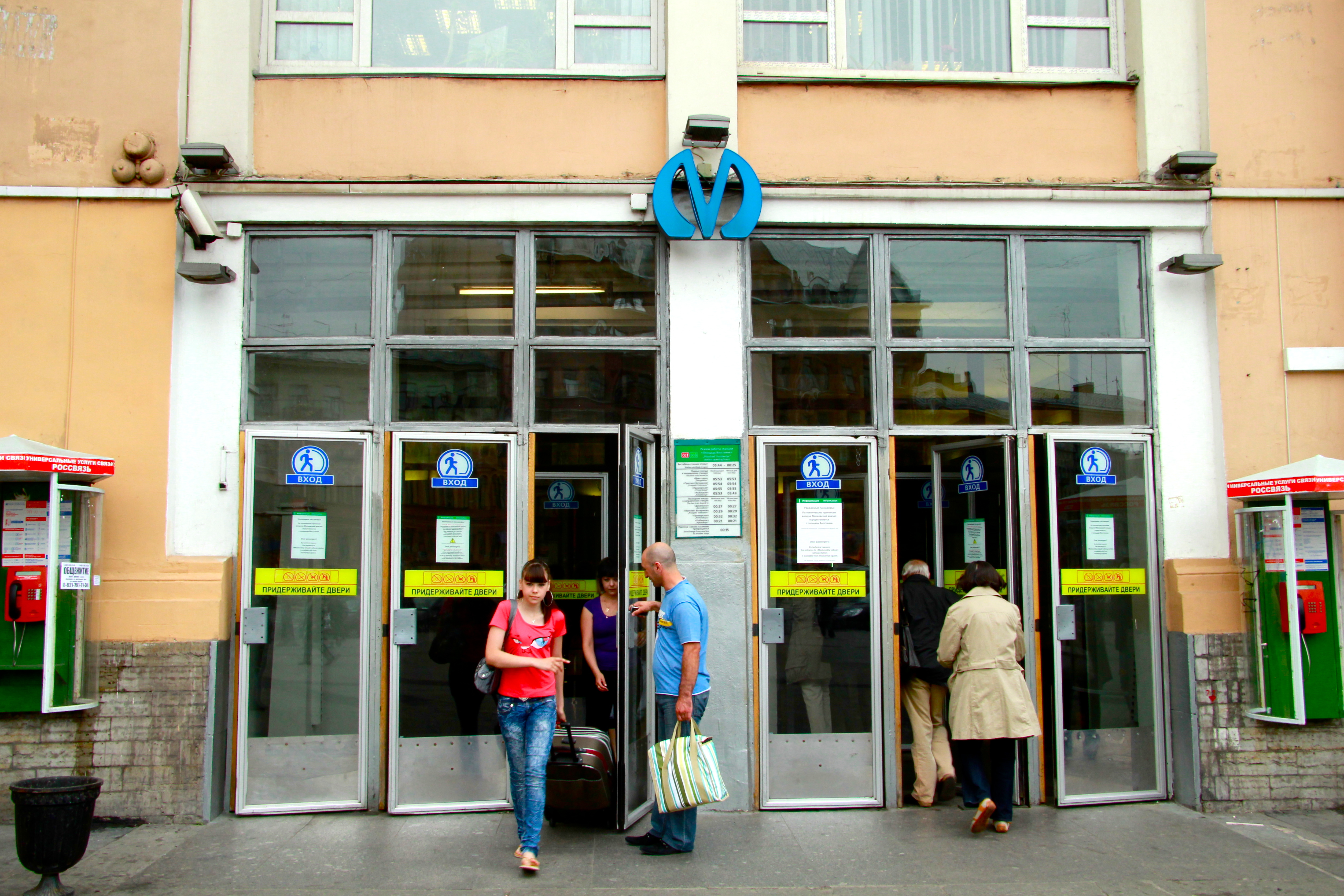 St. Petersburg Metro (Петербургский метрополитен) Kirovsko-Vyborgskaya Line (Кировско-Выборгская линия)